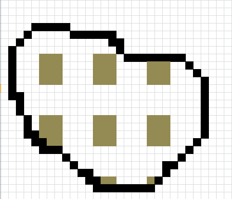 Penggambaran Uniform Systematic Distribution